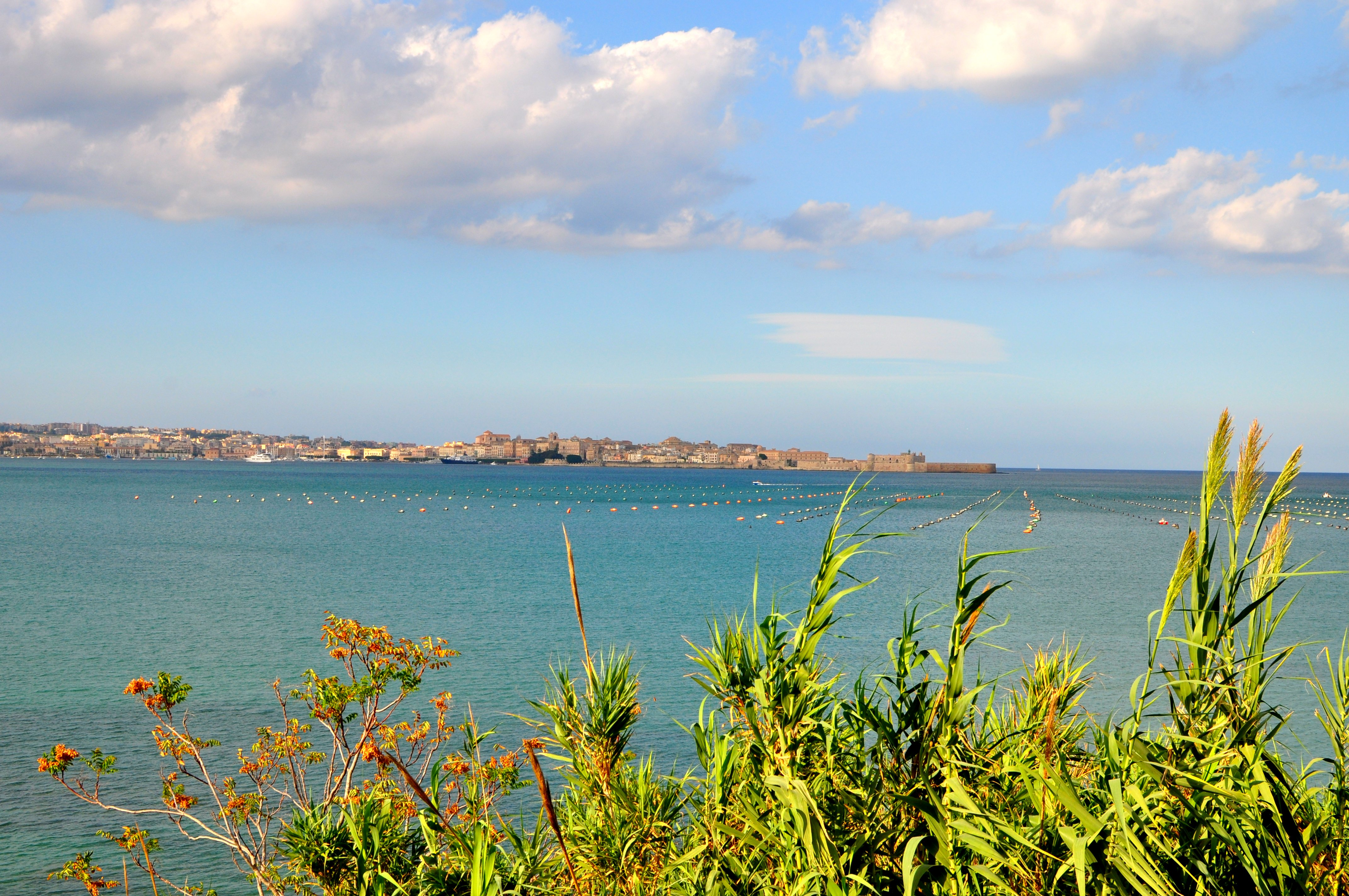 Matin, visite du quartier d'Ortigia à Syracuse, biagnade l'après-midi